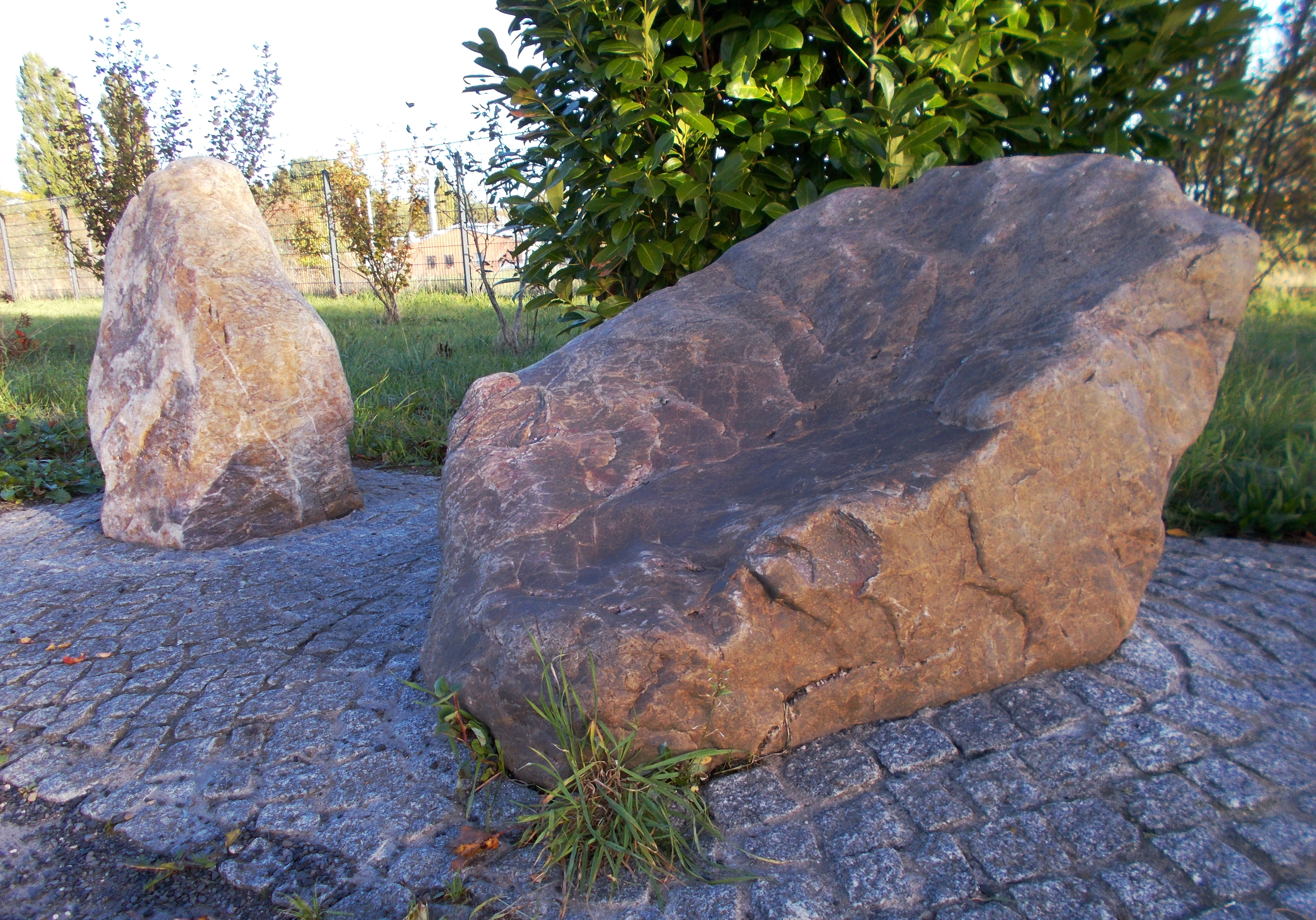 Findlingsweg Sonsbeck Station 8: Devon Quarzit (bräunlich)